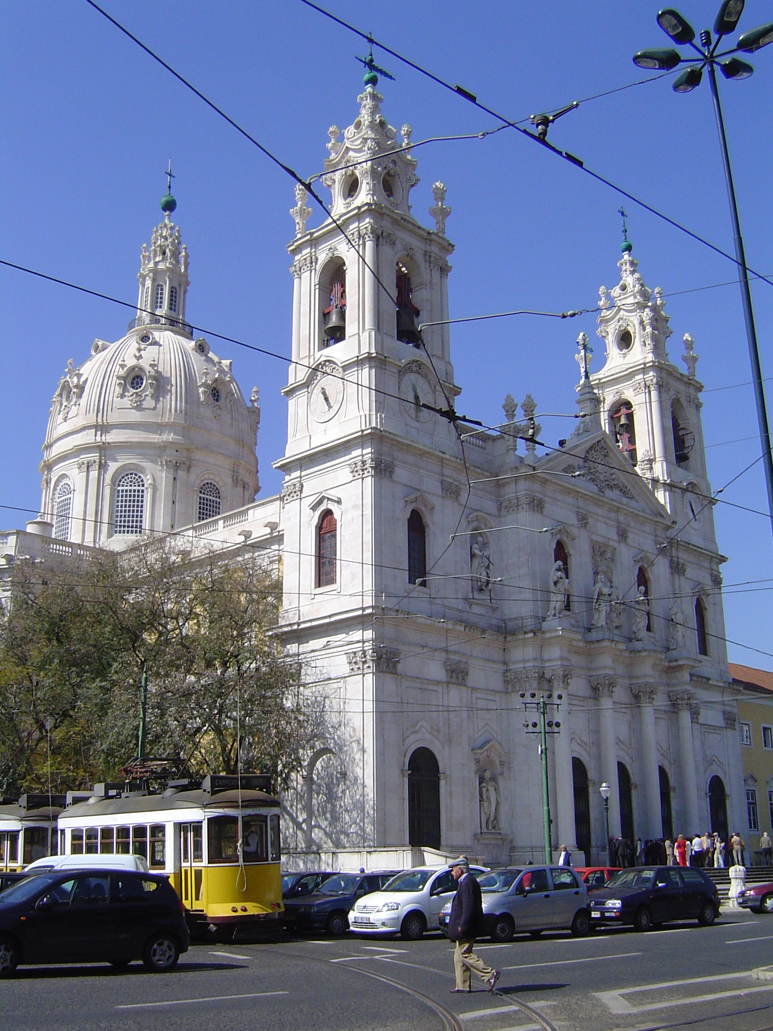 Estrela Basilica in Lisbon, Portugal